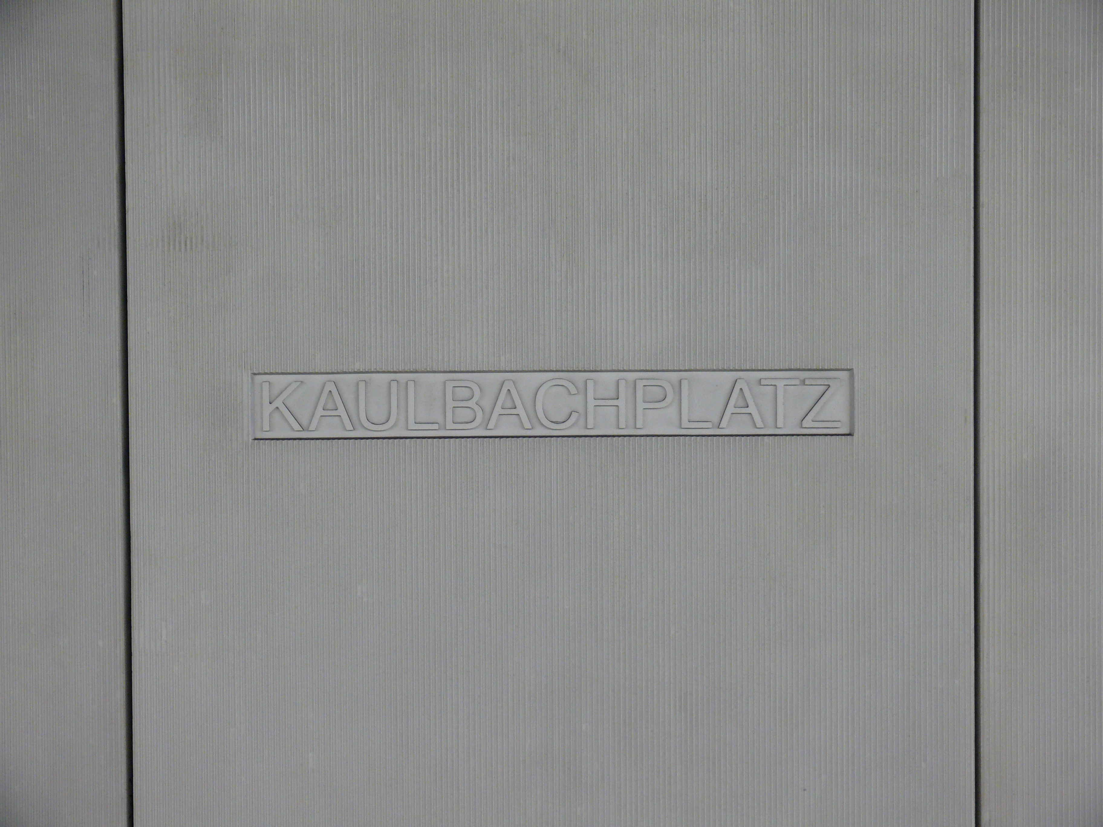 Stationsname an den Bahnsteigwänden am U-Bahnhof Kaulbachplatz in Nürnberg.